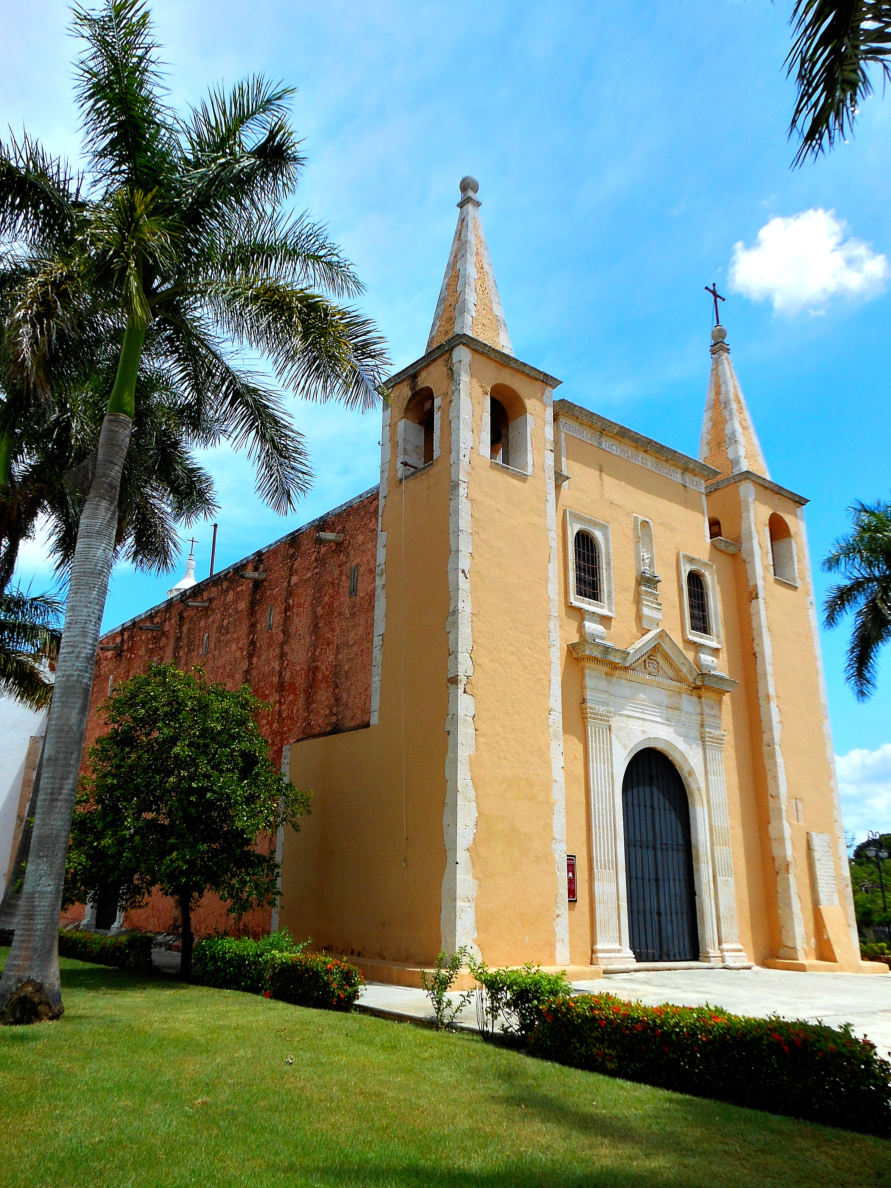 Una iglesia pequeña ubicada en el barrio de santa ana en la ciudad de Mérida yucatán. Consagrada en 1733 tiene un esquema de cruz latina sobre un atrio levantado aparentemente levantado sobre una plataforma maya.